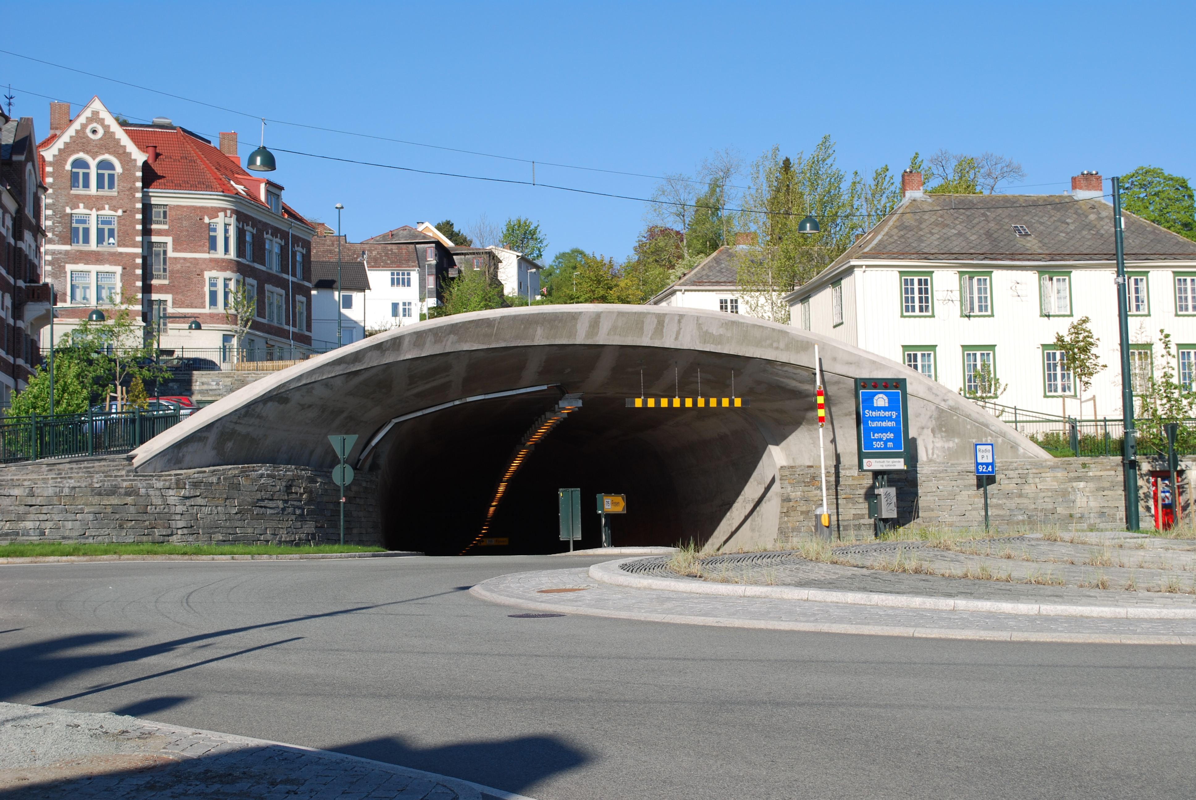 Steinbergtunnelen med en lengde på 505 meter ved Ila i Trondheim.